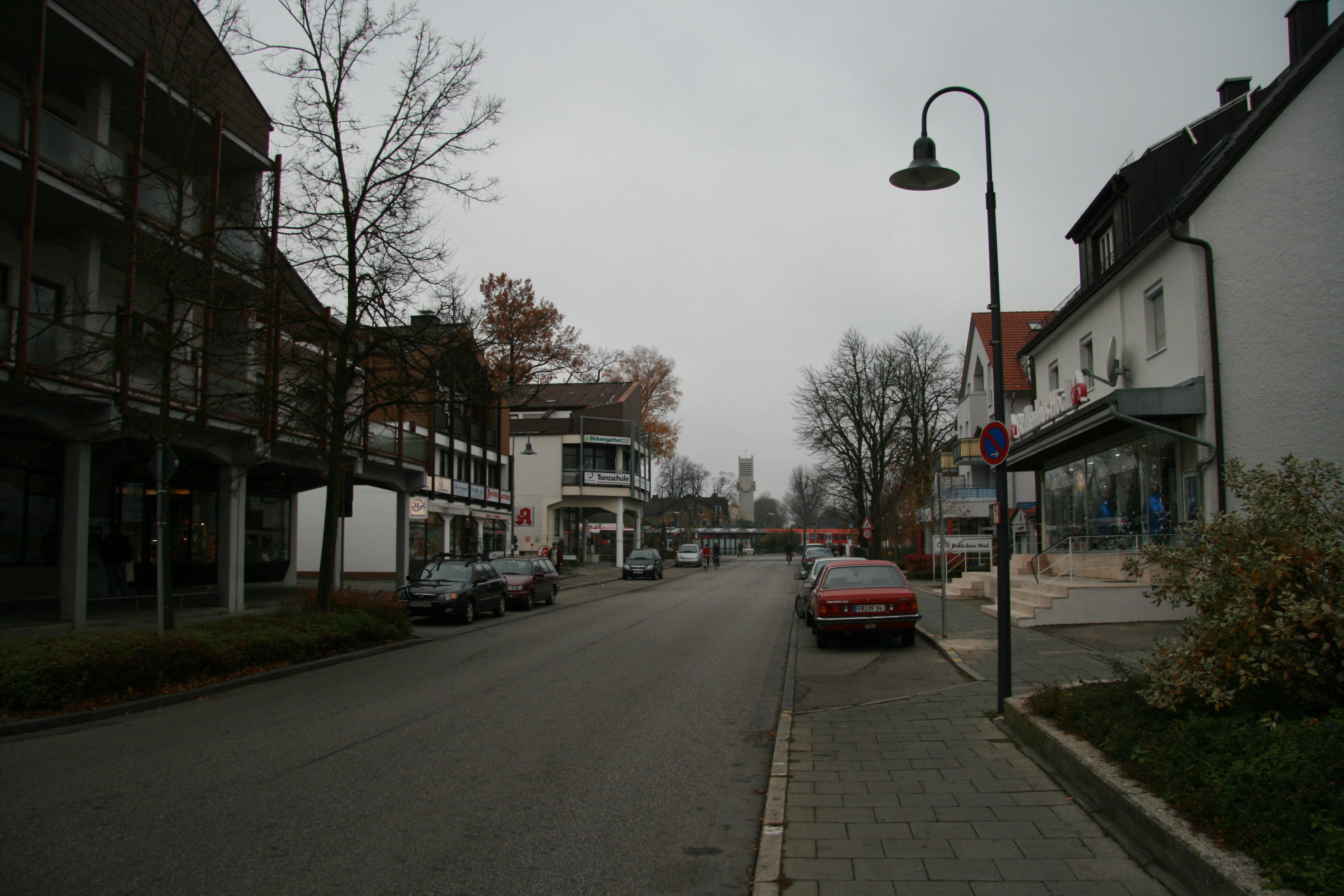 Zentrum von Puchheim-Bahnhof im Herbst mit S-Bahn und Pfarrkirche St. Josef